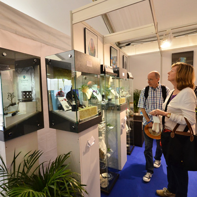 Joaillerie